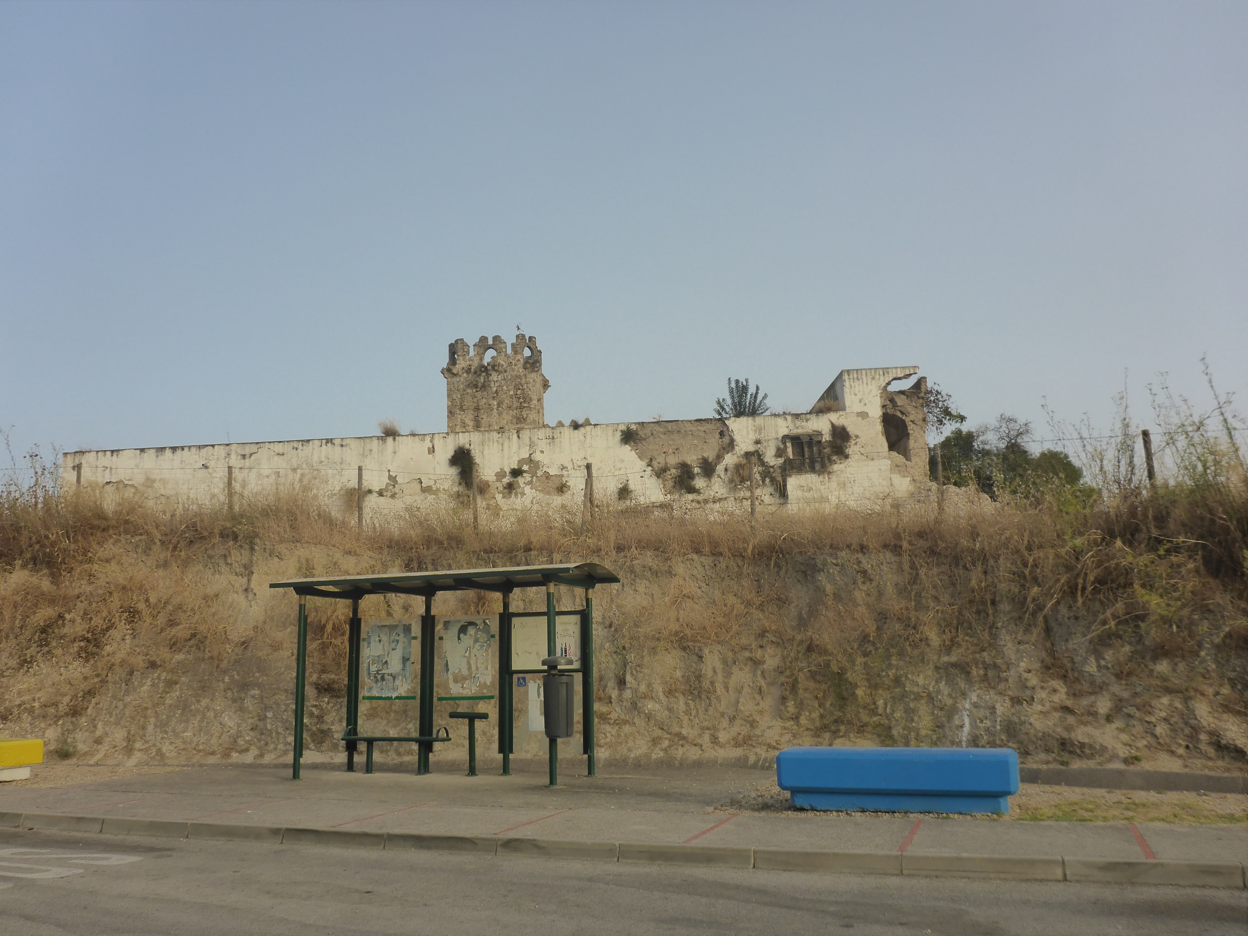 castillo de Torremelgarejo con derrumbe esquina